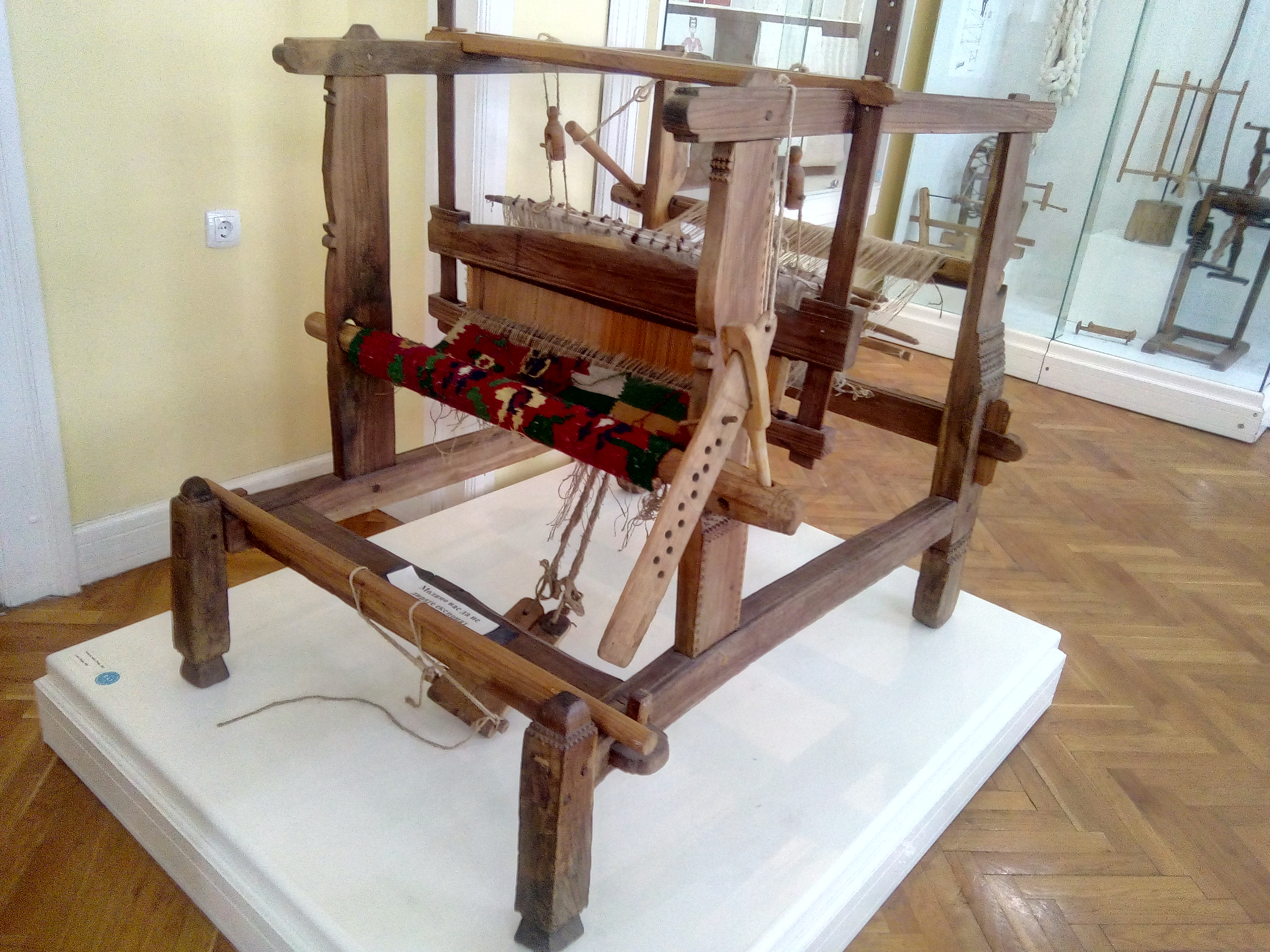 Eksponat u Muzeju Vojvodine u Novom Sadu